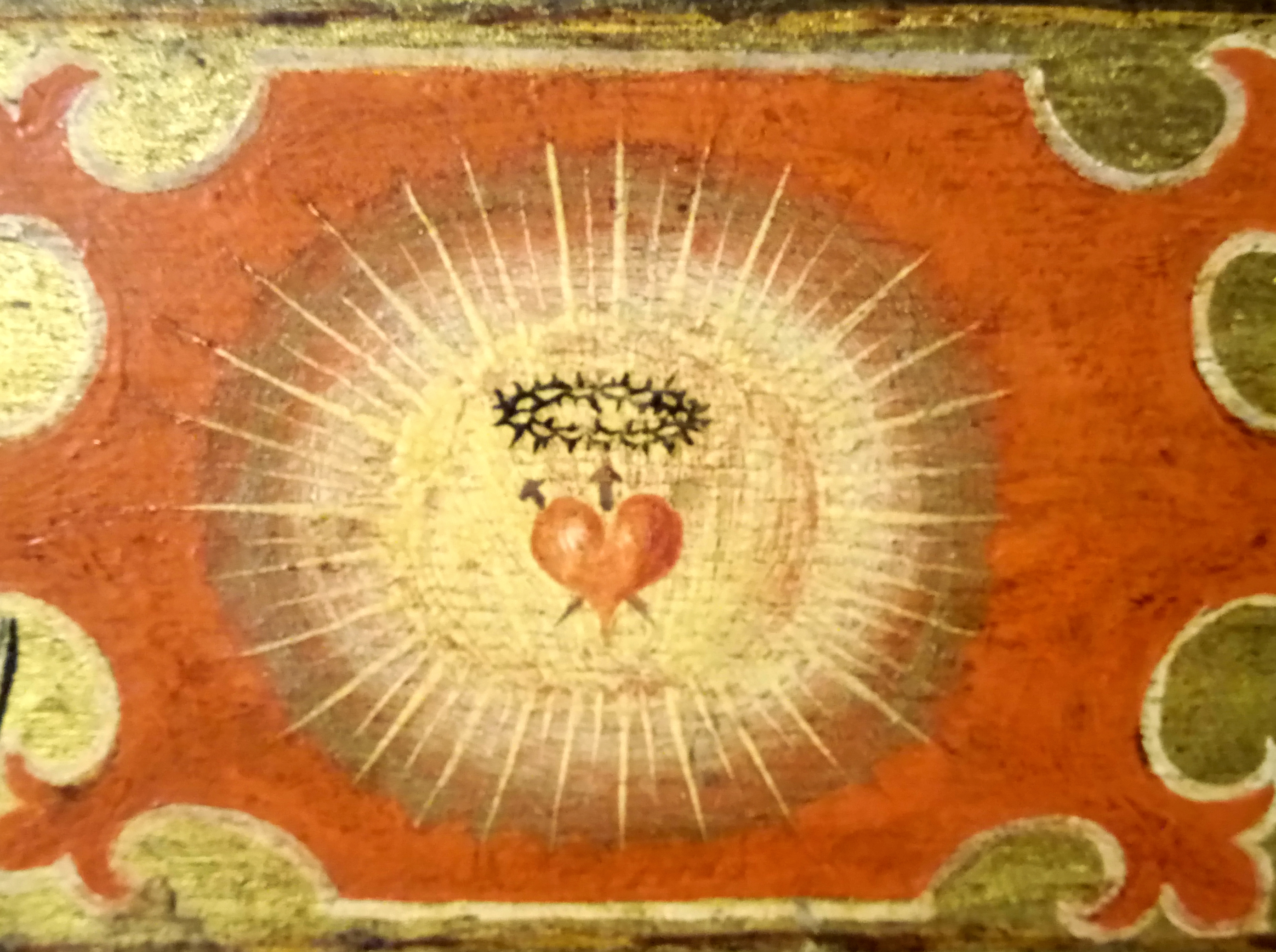 Photographie d'un des panneaux de la chapelle dorée de l'église Saint Gervais-Saint Protais à Paris, représentant le coeur rayonnant de Jésus Christ, peint vers 1630.